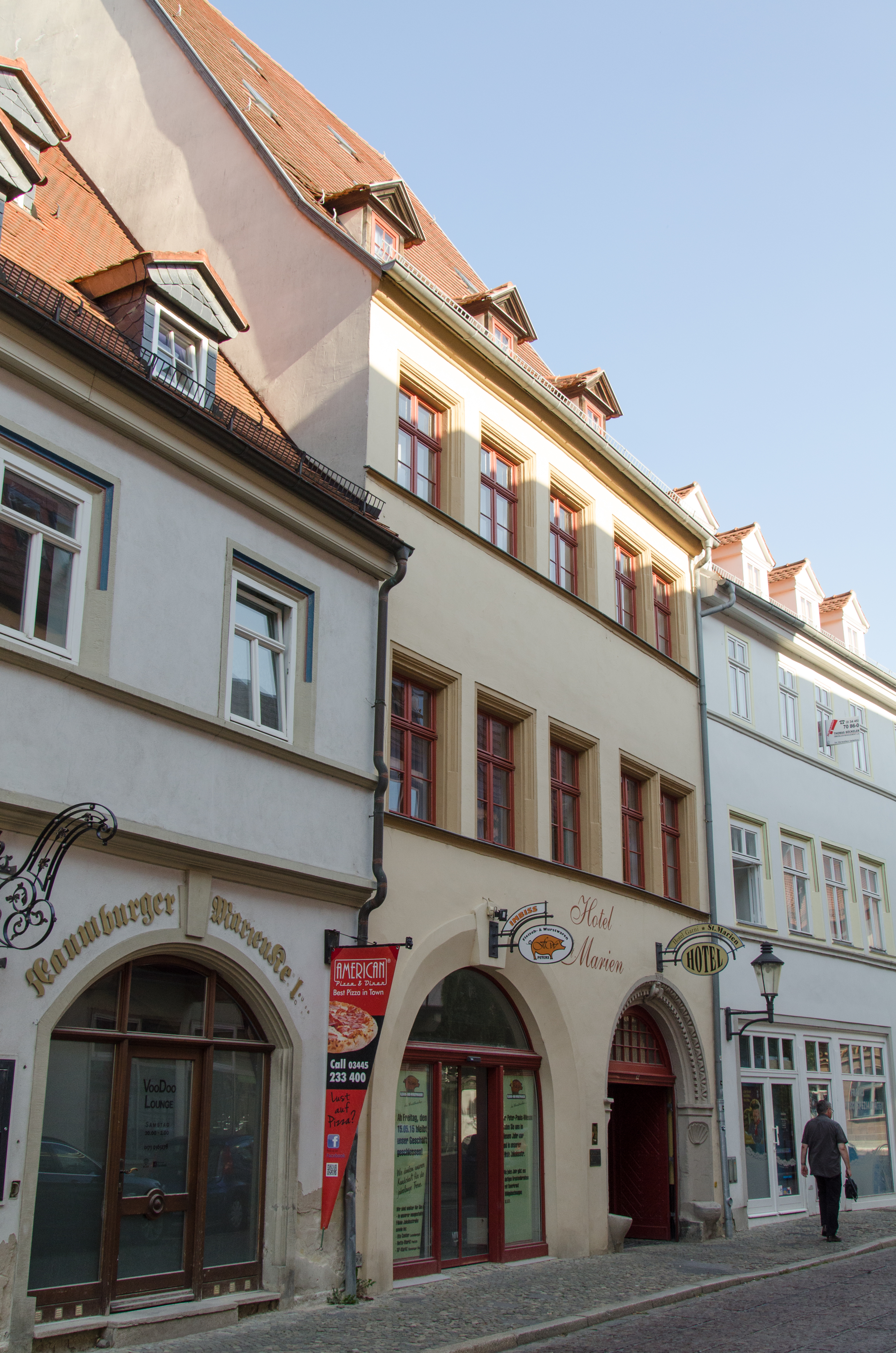 Naumburg, Marienstraße 12